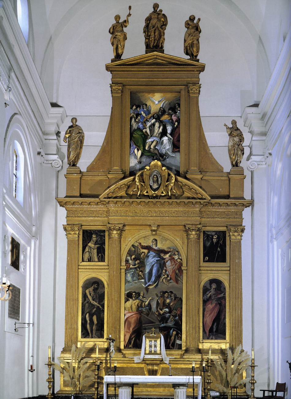 Este retablo fue realizado por El Greco entre 1577 y 1579.